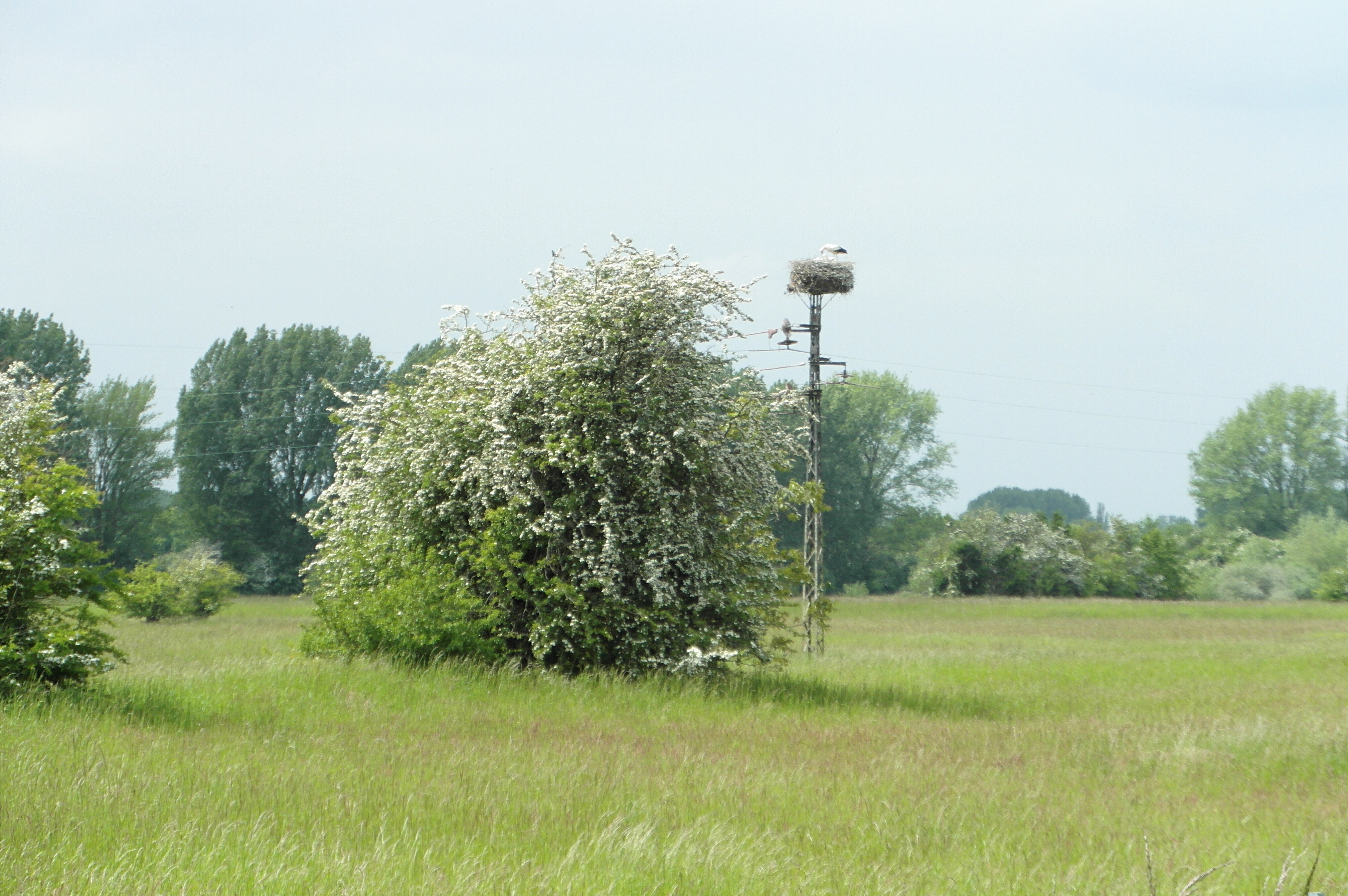 Storchennest auf einer Wiese im Landschaftsschutzgebiet LSG H 00021 „Obere Leine“ zwischen Alter Leine und Leine nördlich von Koldingen